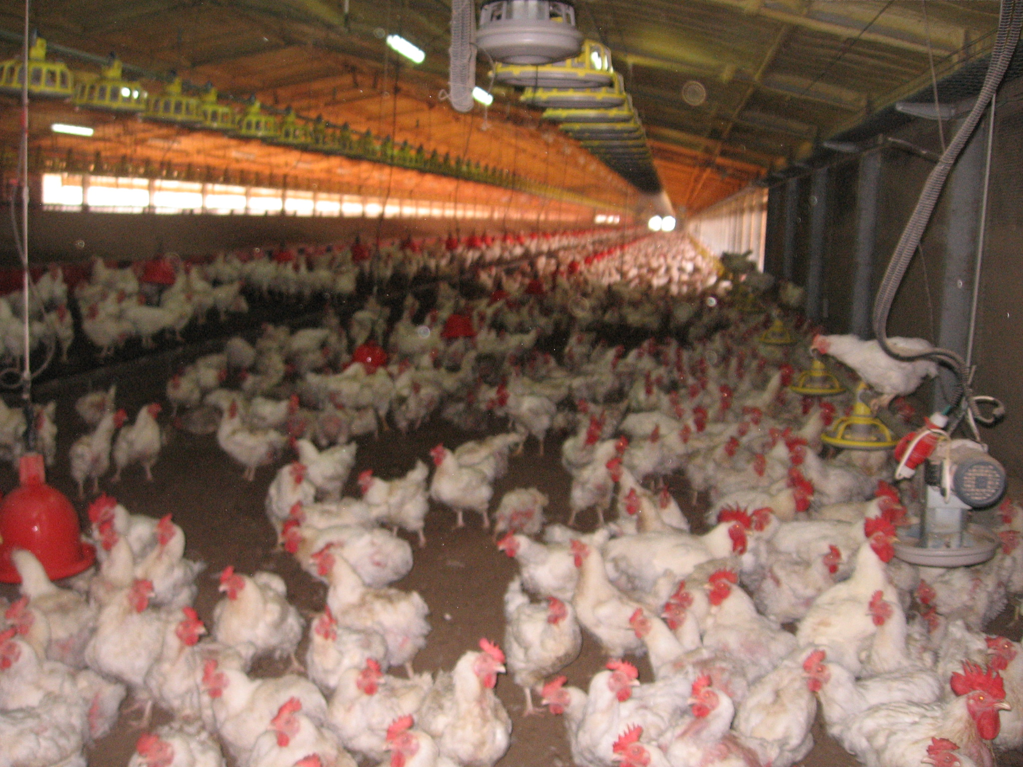 reproductioncoop